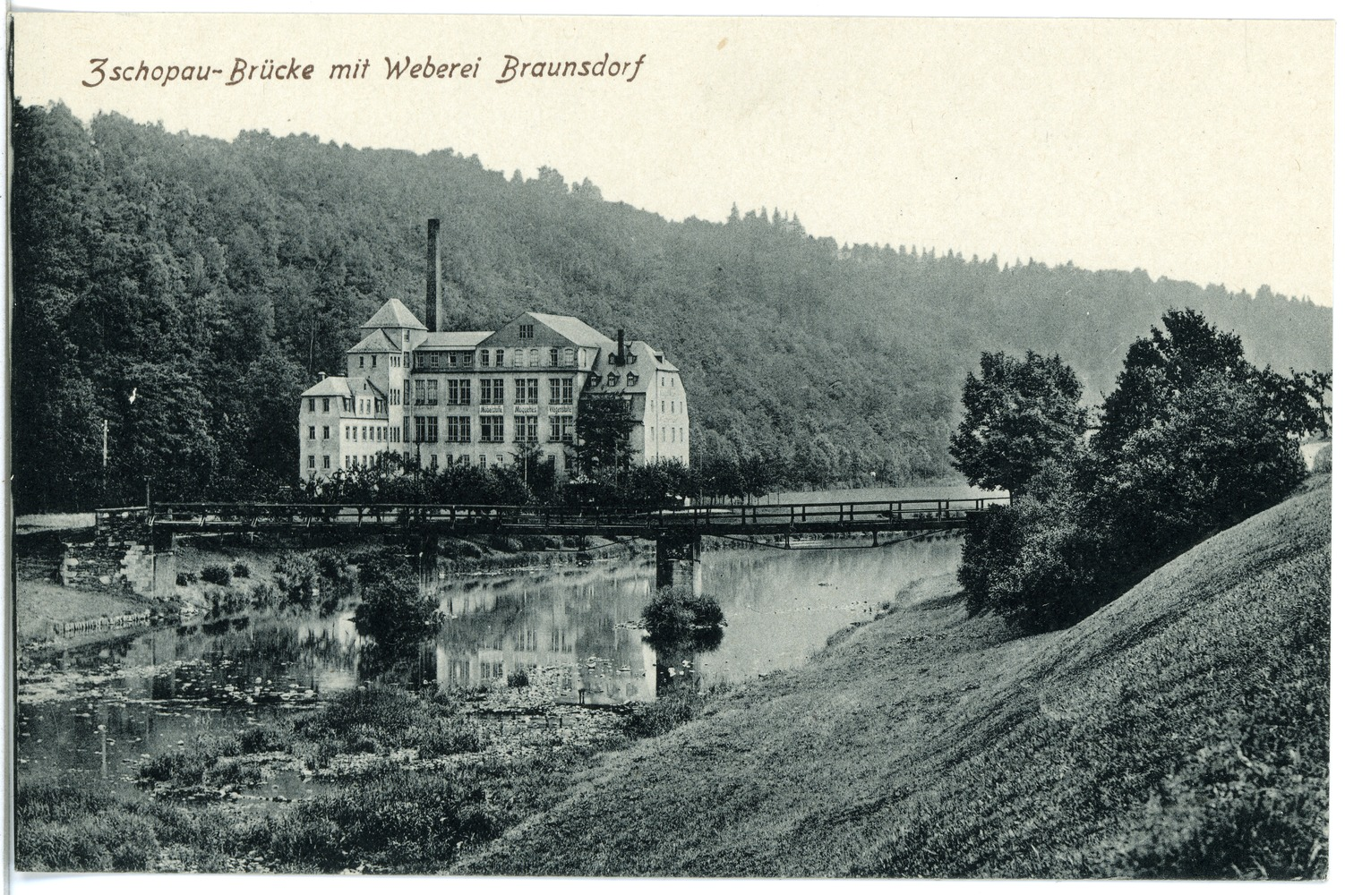 Braunsdorf; Zschopaubrücke mit Weberei Braunsdorf This postcard is from publisher Brück & Sohn in Meißen ( postcard has a unique number 18330 and is available in a higher resolution at the publisher. This images was uploaded in a cooperation project between Wikipedians and the publisher.